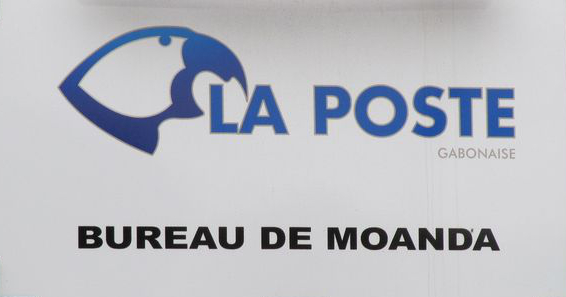 Enseigne du bureau de poste de Moanda, au Gabon 2010